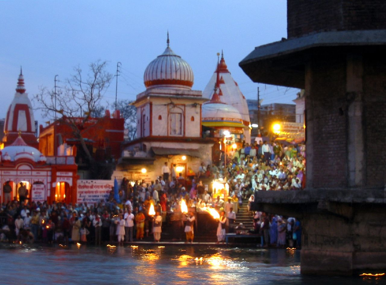 Церемонія Аарті в Харідварі